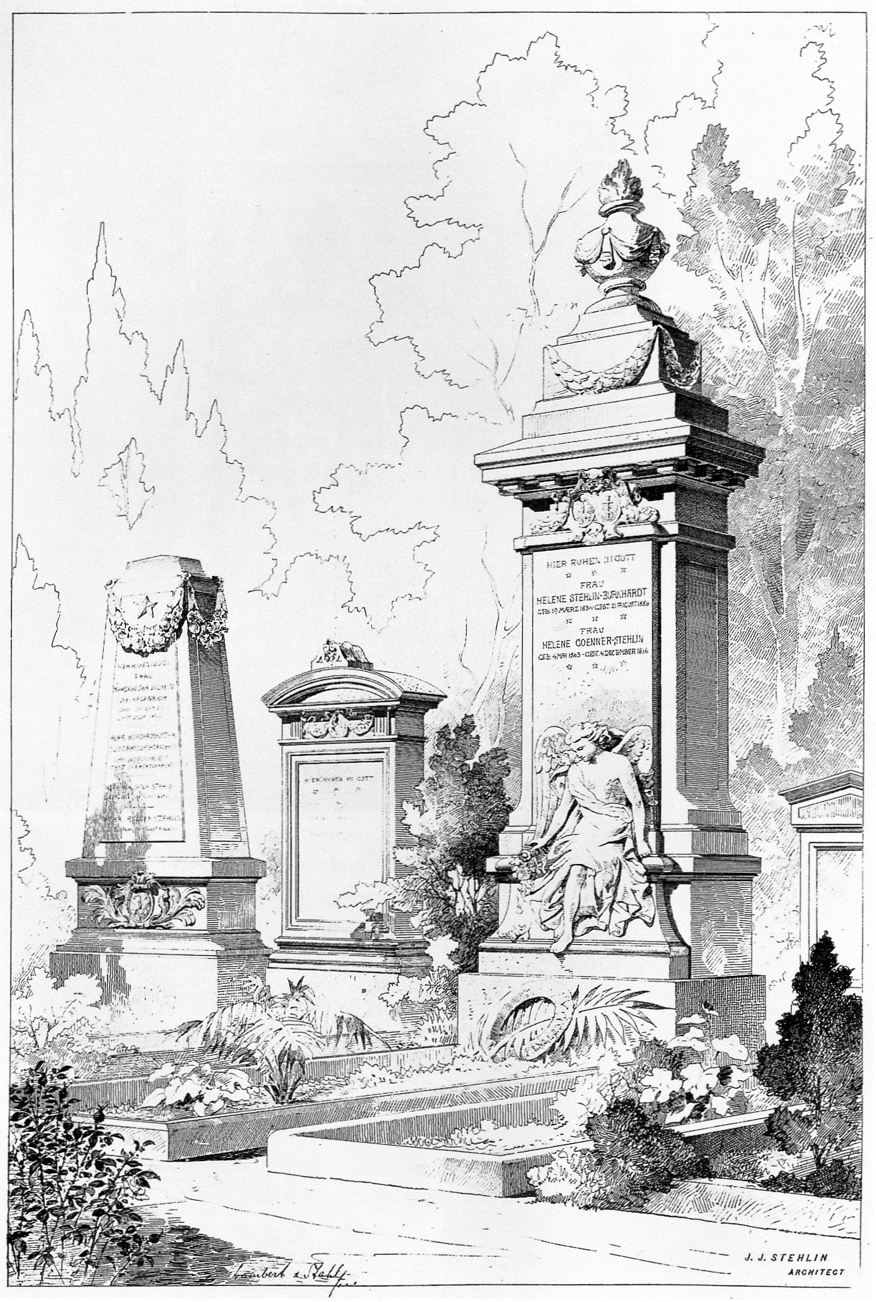 Grabmal der Familie Stehlin auf dem Wolfgottesacker in Basel. Lithografie von Johann Jakob Stehlin d. J. (1826–1894) aus dem Jahr 1893. Stehlin war seit 1855 mit Helena Burckhardt (1836–1886) verheiratet. Zusammen hatten sie drei Kinder. Das von ihm entworfene Grabmonument wurde 1886 für seine Frau und seine Tochter sowie für sich selbst, errichtet. Der Architektonischer Aufbau wurde vom Atelier David Doret in Vevey und der Engel aus Carrara-Marmor vom Genfer Bildhauer Charles-François-Marie Iguel (1827–1897) ausgeführt. Begraben wurden sie ursprünglich auf dem Kannenfeld-Gottesacker. Nach der Auflösung des Friedhofes wurde das Grab auf den Wolfgottesacker versetzt. Später wurde sein Enkel Alfred Adolf Goenner (1885–1929) Ingenieur der Markthalle und dessen Frau Anna Maria Goenner-Smeykal (1893–1929) dort beigesetzt. Links neben dem Grabmonument ist das Grab seiner Eltern und seiner früh verstorbenen zwei Söhne.Links neben dem Grabmonument ist das Grab seiner Eltern und seiner früh verstorbenen zwei Söhne.